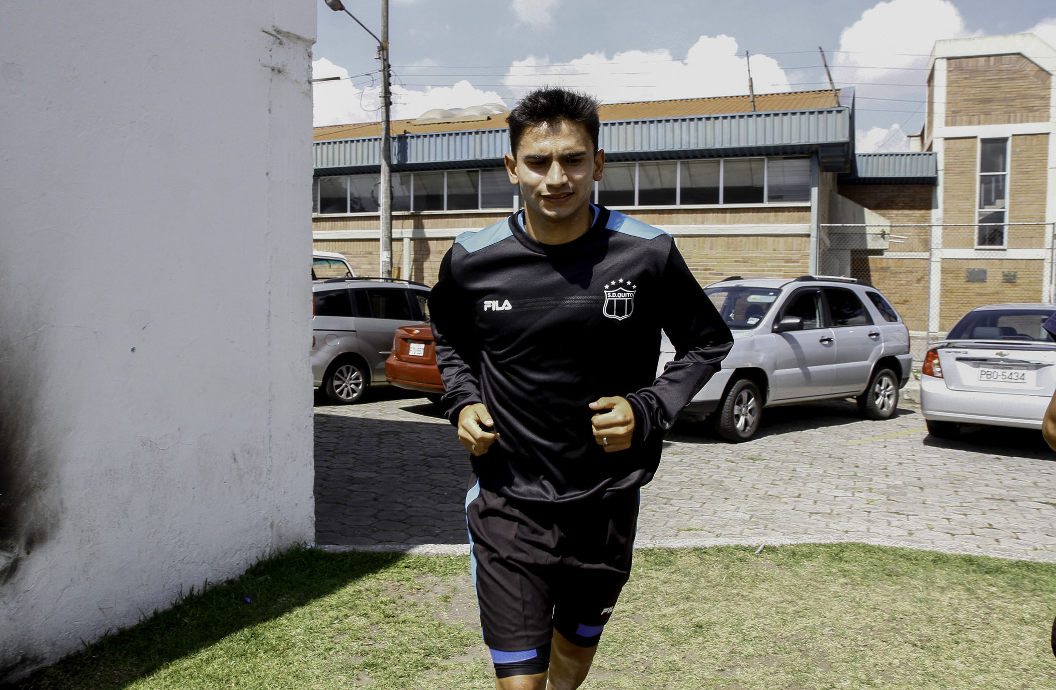 Quito, 03 mar (ANDES).- El equipo del Deportivo Quito presentó en su sede ubicada al norte de Quito, a su nueva contratación Luis Fernando Saritama. Foto: Micaela Ayala V./ANDES